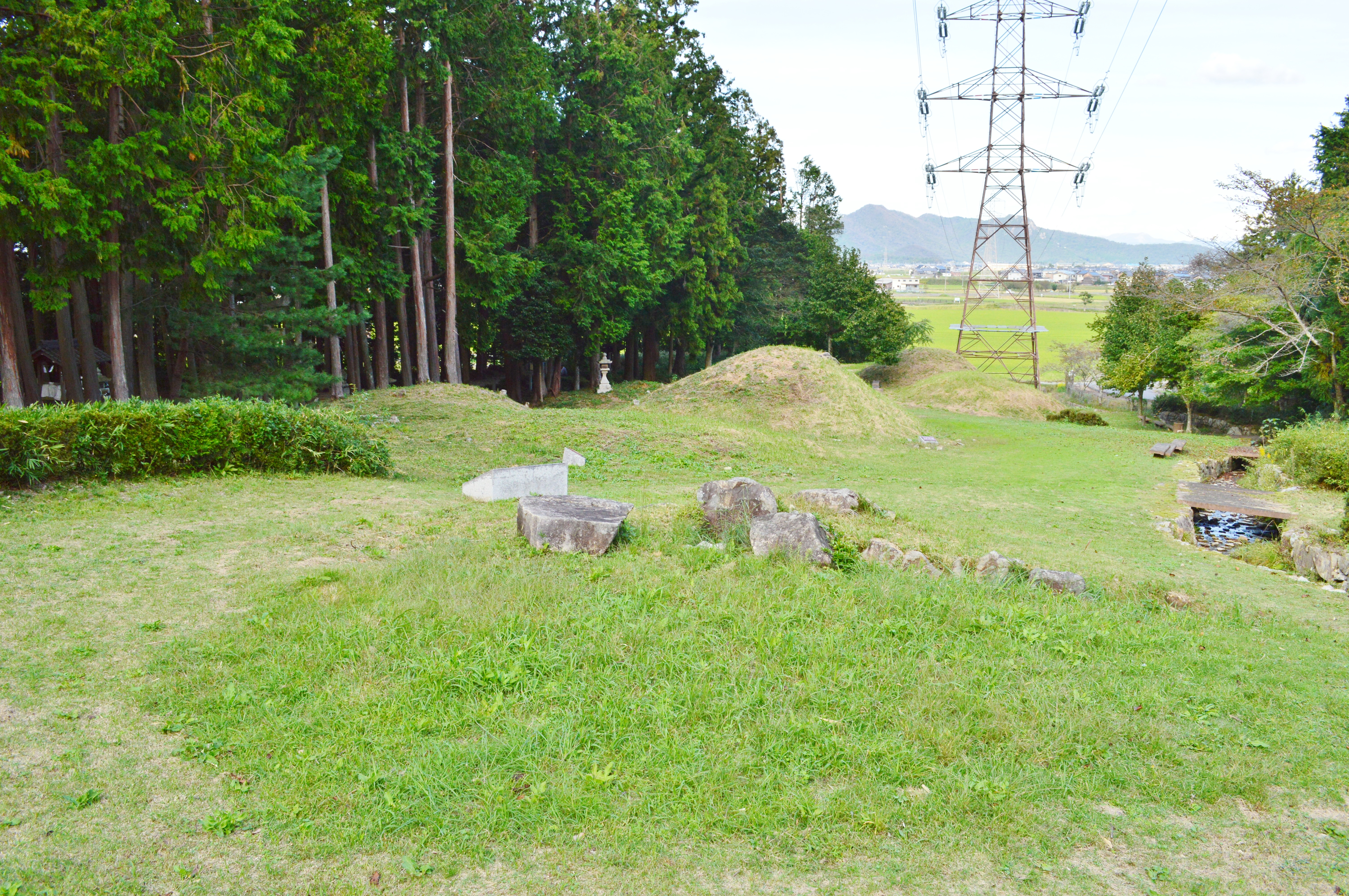 八幡社古墳群 概観